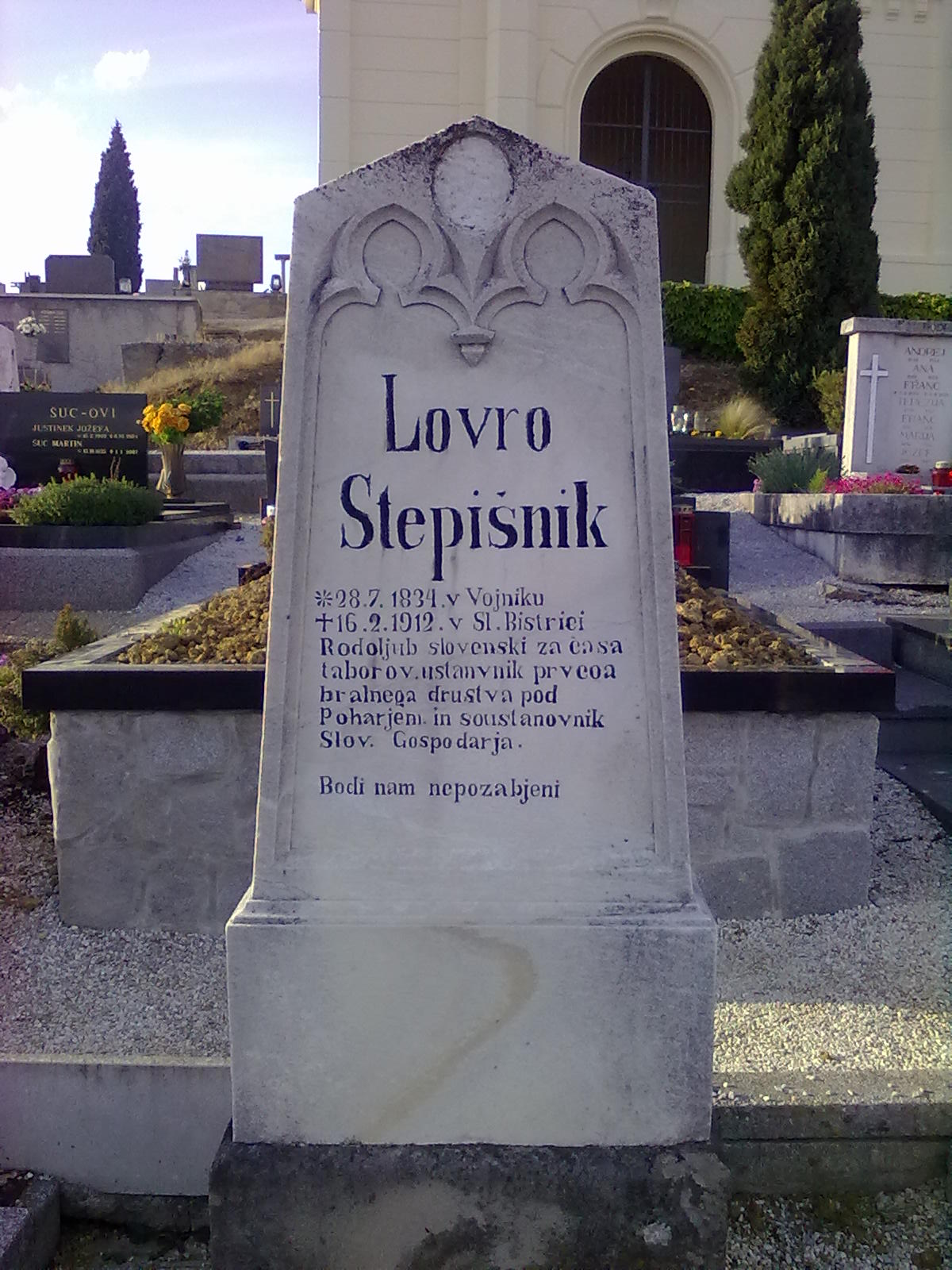 Slika nagrobnika Lovra Stepišnika v Slovenski Bistrici. Besedilo: ovro Stepišnik *28.7.1834. v Vojniku †16.2.1912. v Sl. Bistrici Rodoljub slovenski za časa taborov, ustavnik prvega bralnega društva pod Poharjem in soustanovnik Slov. Gospodarja. Bodi nam nepozabljeni